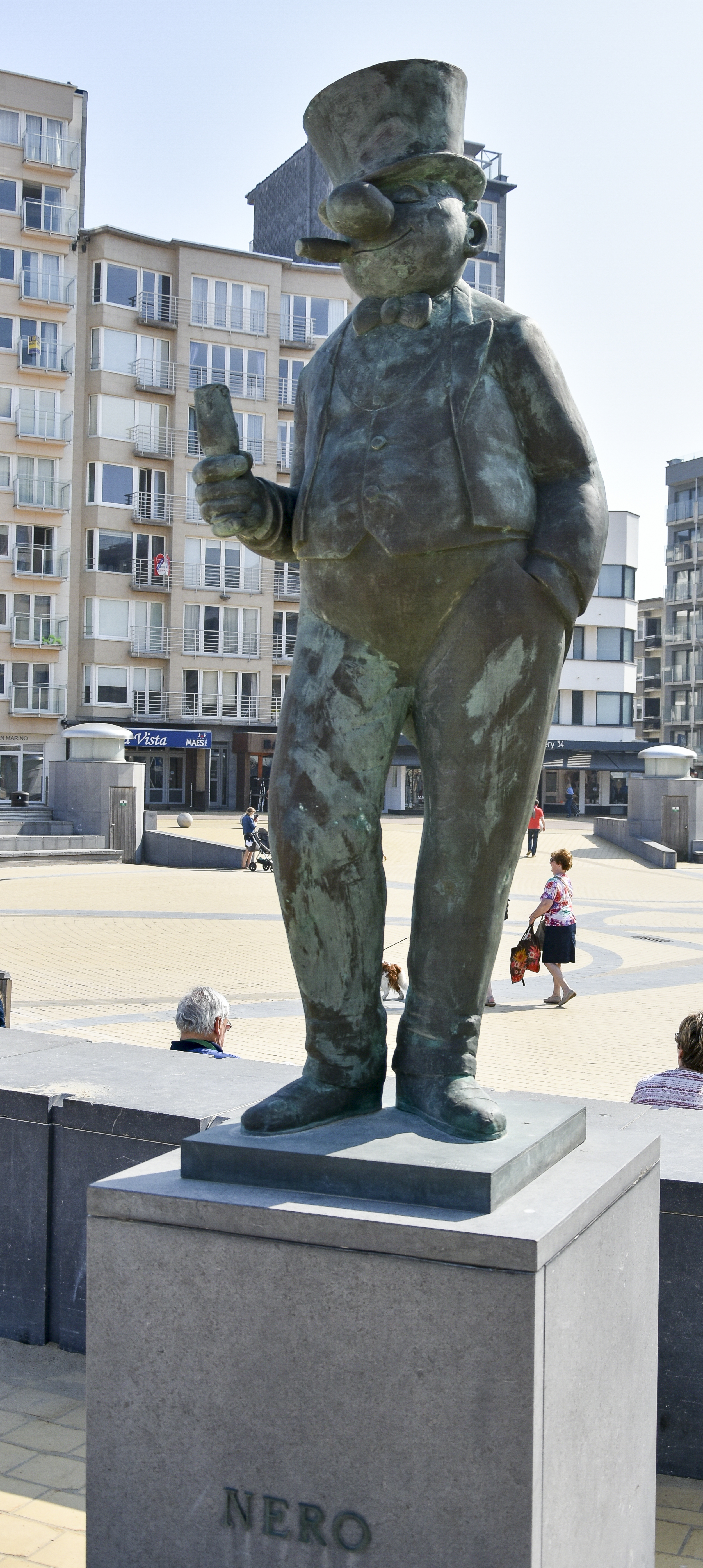 Jan Maillard - Nero - Stripstandbeelden Middelkerke